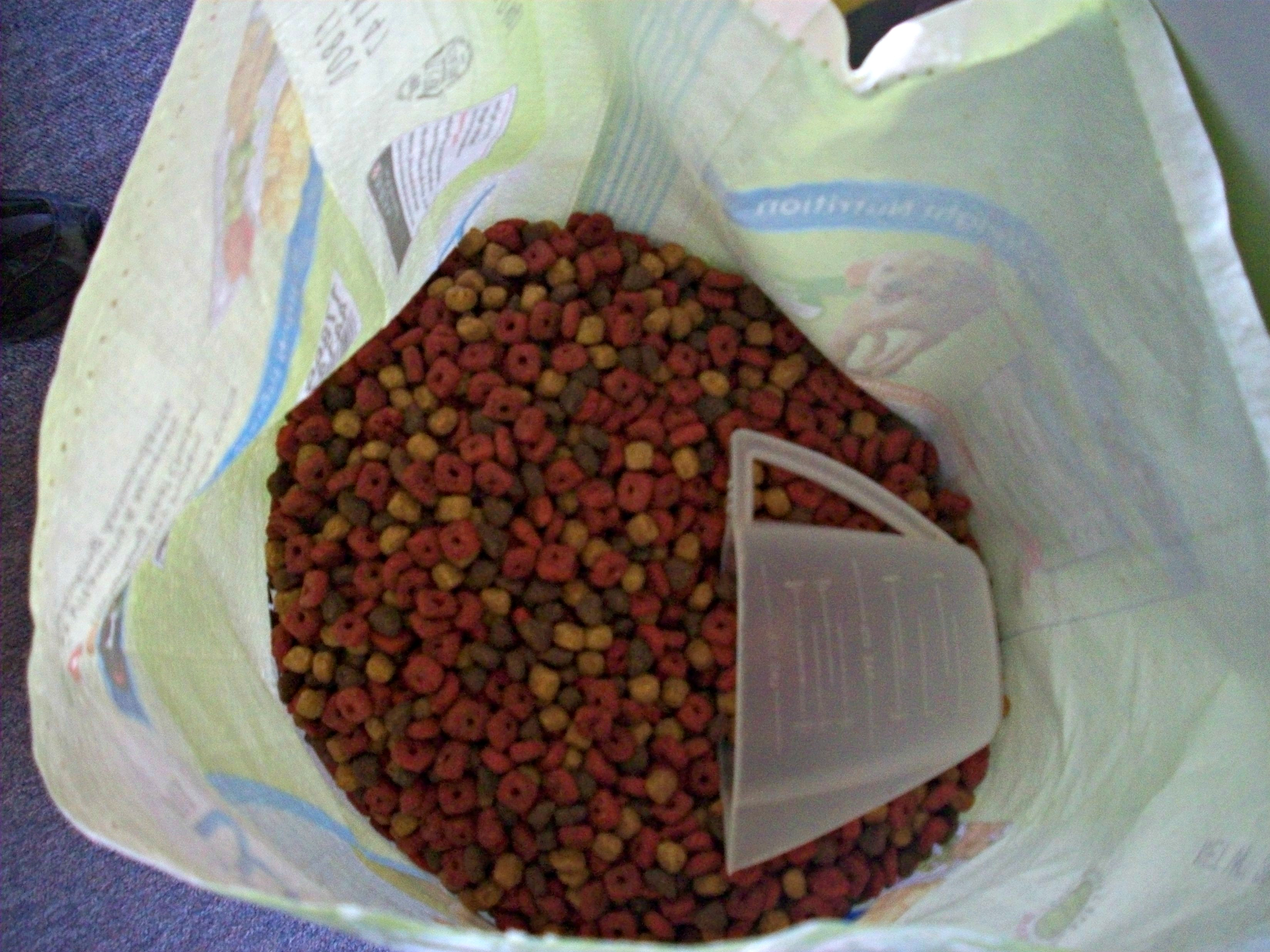 dog food kibble